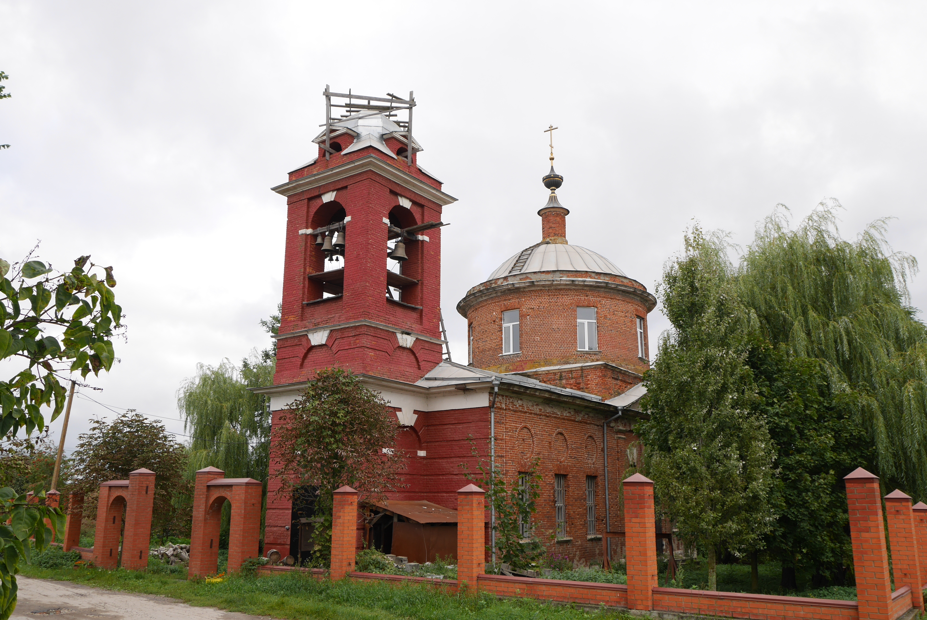 Церковь Казанской иконы Божией Матери: Ачкасово, Воскресенский район, Московская область